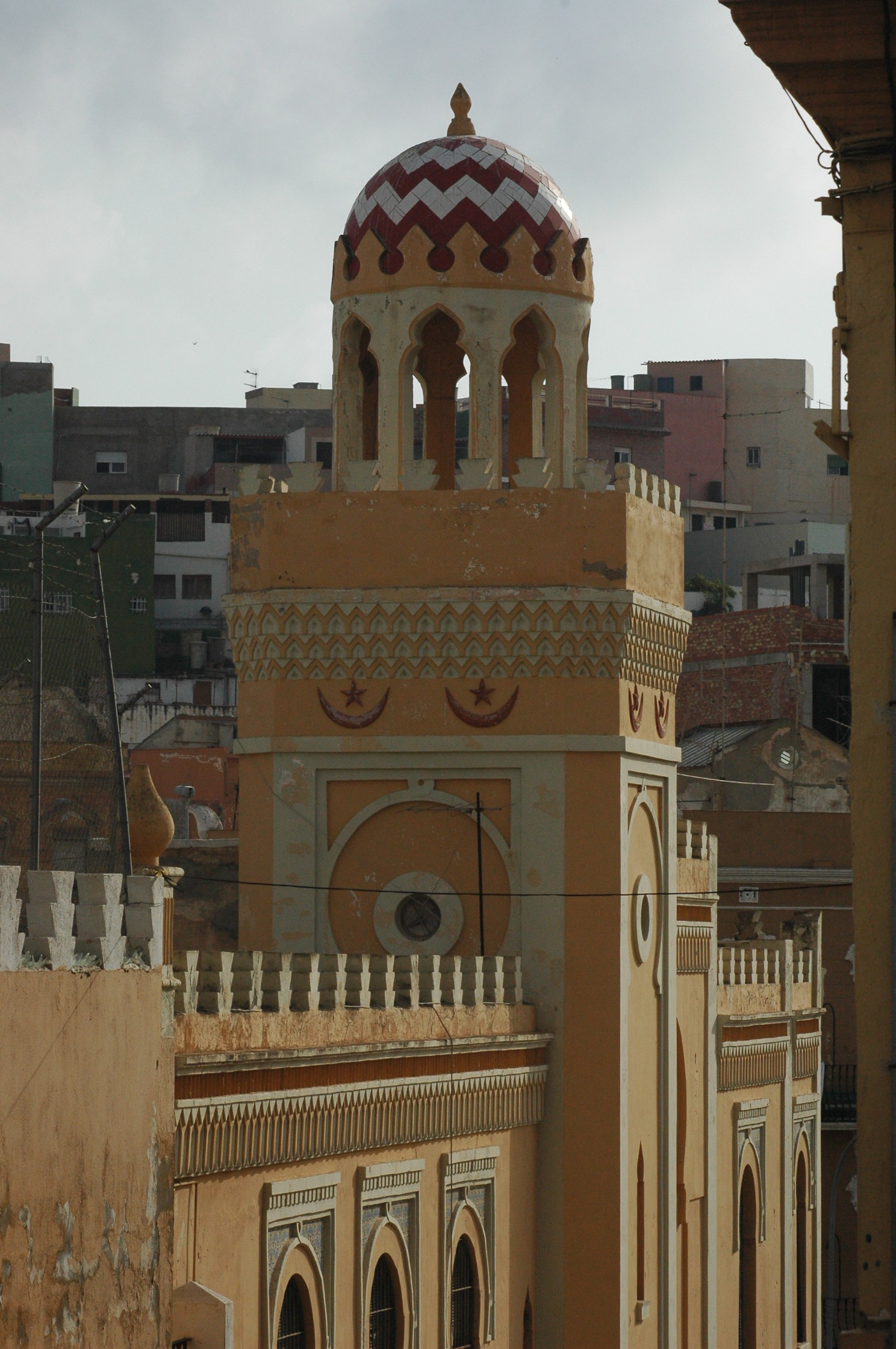 Mezquita